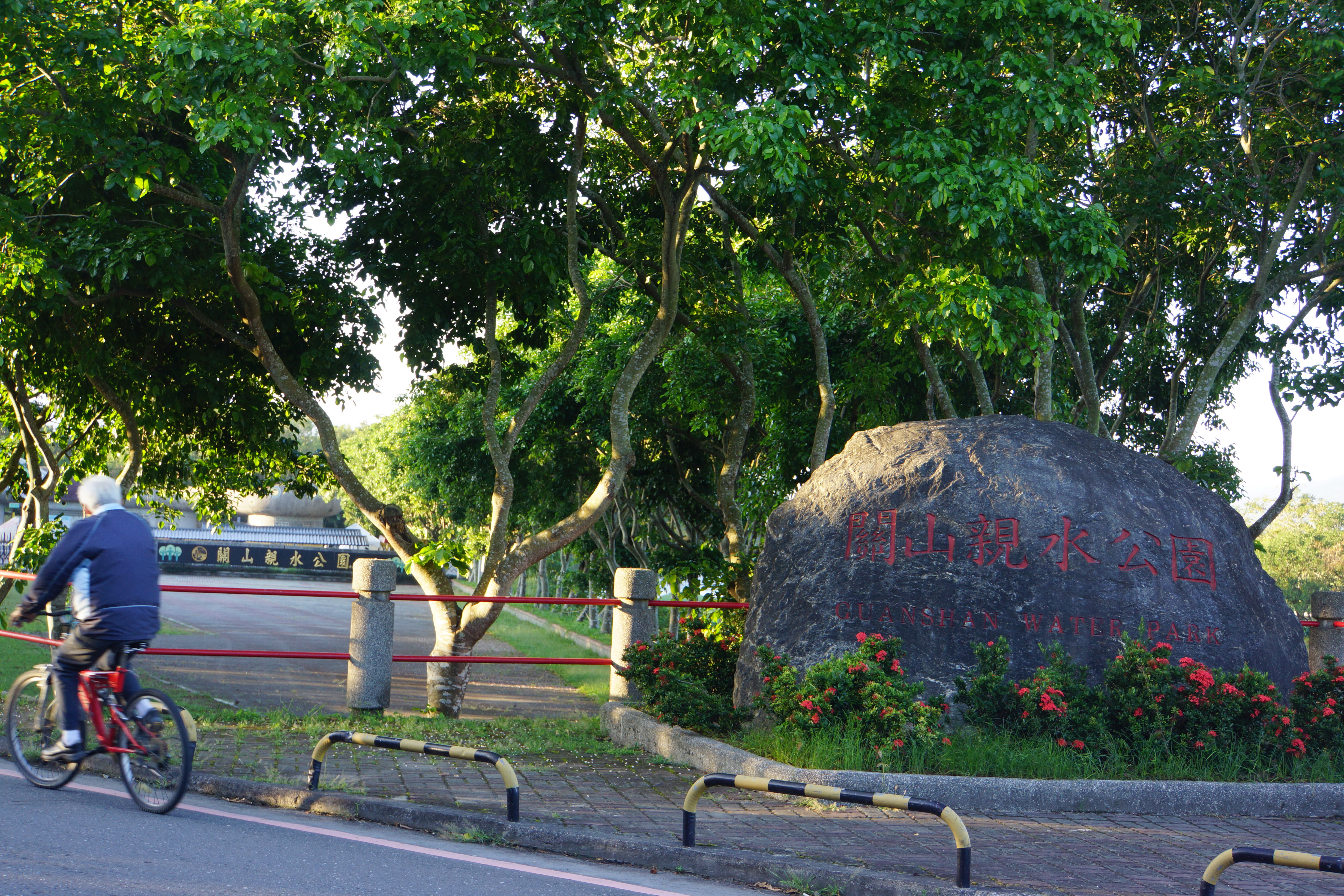 關山親水公園 Guanshan Water Park